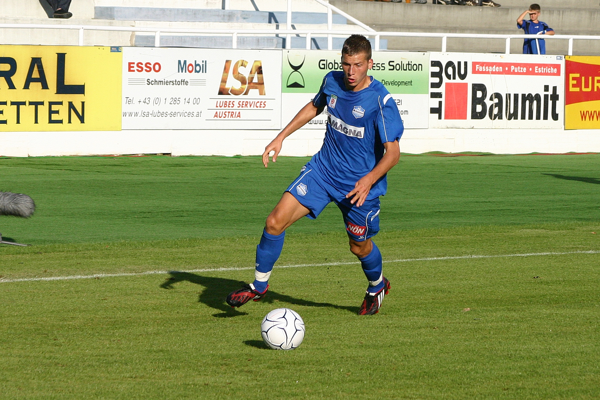 Guido Burgstaller (FC Magna Wiener Neustadt)